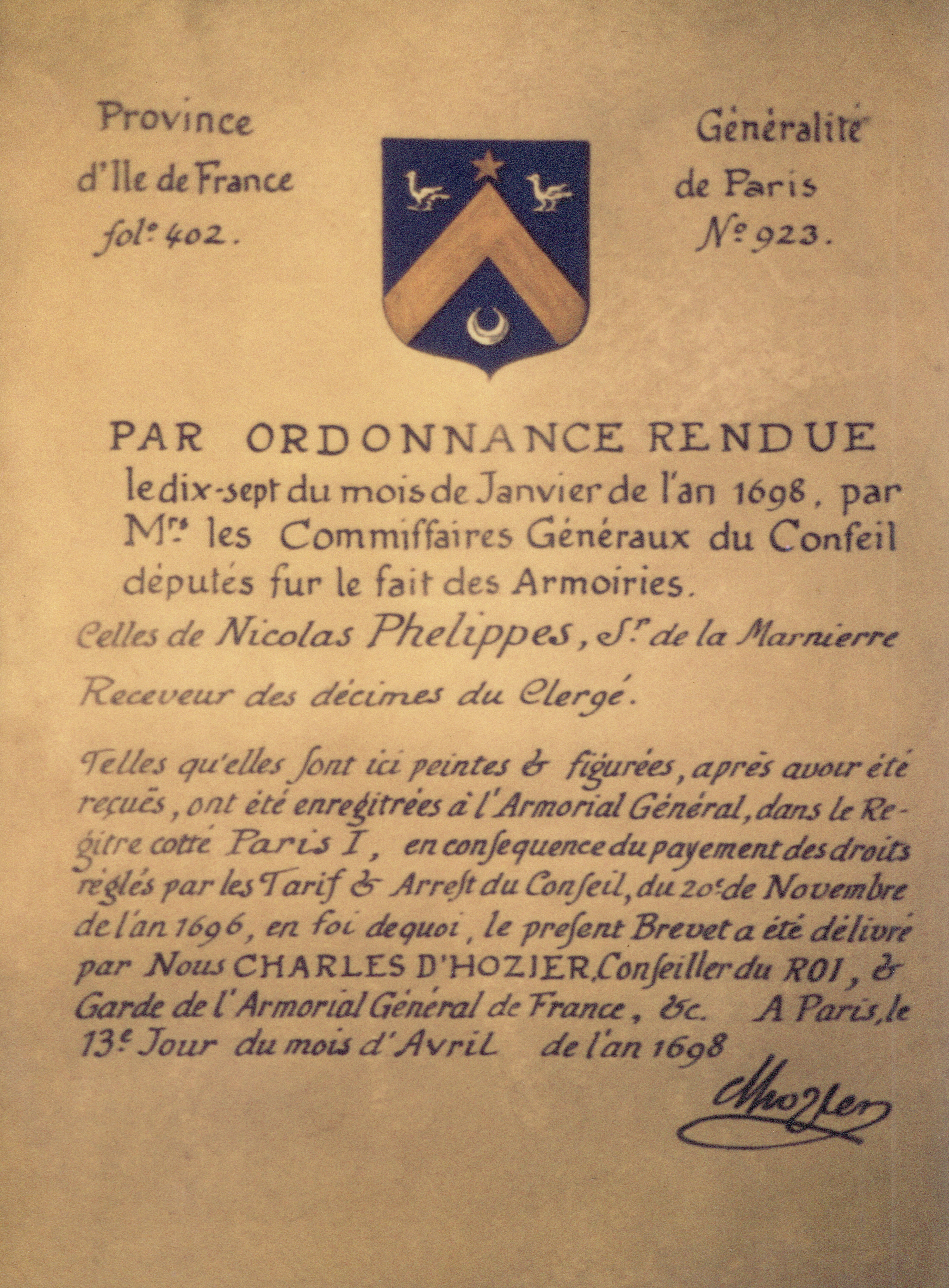 Brevet d'armoiries de Nicolas Phelippes, sieur de La Marnierre. À noter que le blason est erroné : il faut des merlettes au lieu des canettes.Blason vectoriel des Phelippes de La MarnierreHOZIER, Charles d'. « Nicolas Philipe, sieur de la Marniere », Armorial général de France, 24e volume d'armoiries (Généralité de Paris, 2e partie), page 1554 (blason erroné)DUBUISSON, Pierre-Paul. « PHILIPES, seigneur de la Mariniere », Armorial des principales maisons de familles du royaume, particulièrement de celles de Paris et de l'Isle de France, Volume 2, blason n° 87, folio 49. (blason erroné)JOUGLA de MORENAS, Henri, WARREN, Raoul de & FRANTZEN, André. « PHELIPPES DE LA MARNIÈRE », Grand Armorial de France, tome 7 : supplément, 1952, p. 415. (blason erroné)